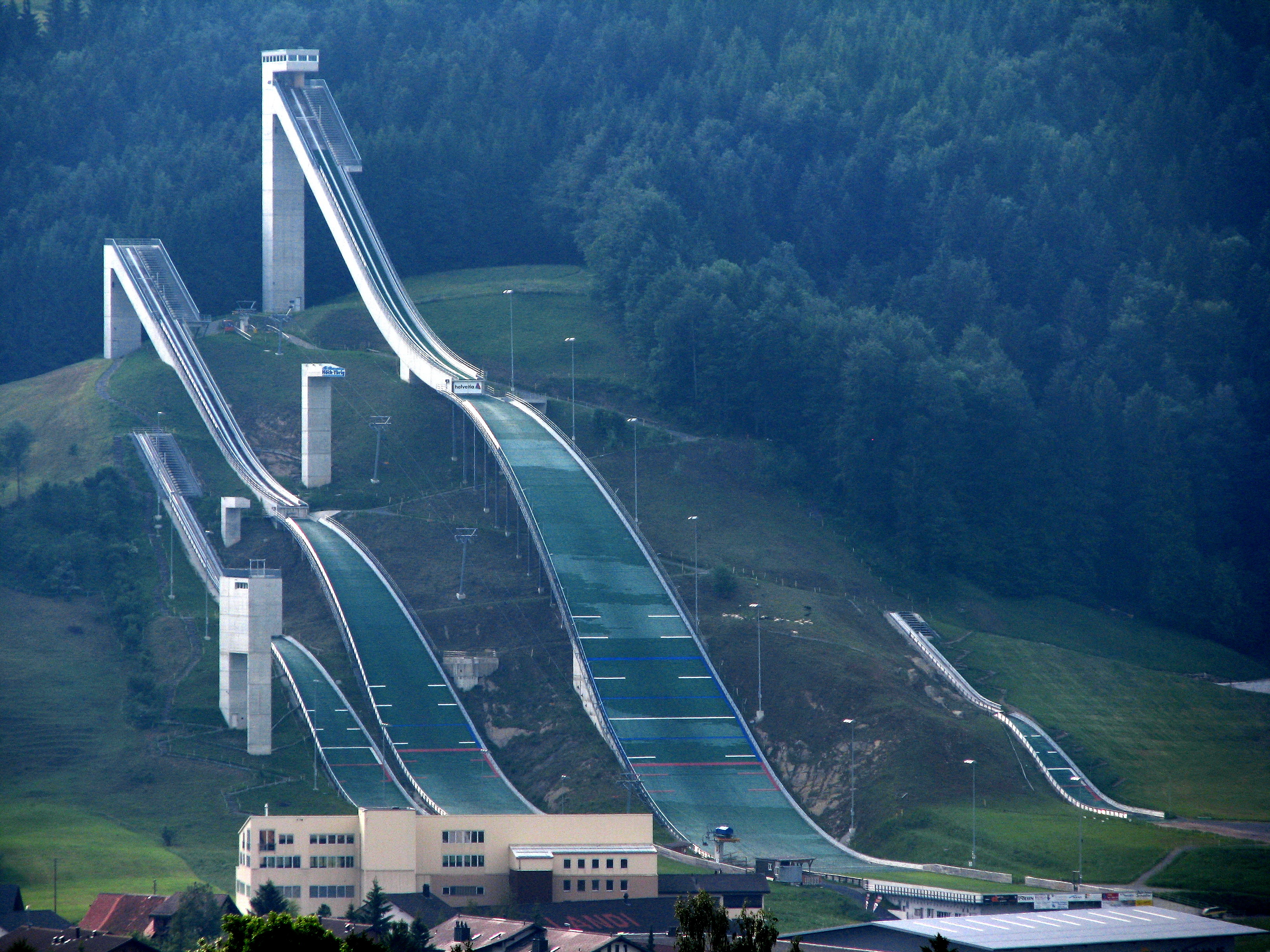 Einsiedeln (SZ) in Switzerland